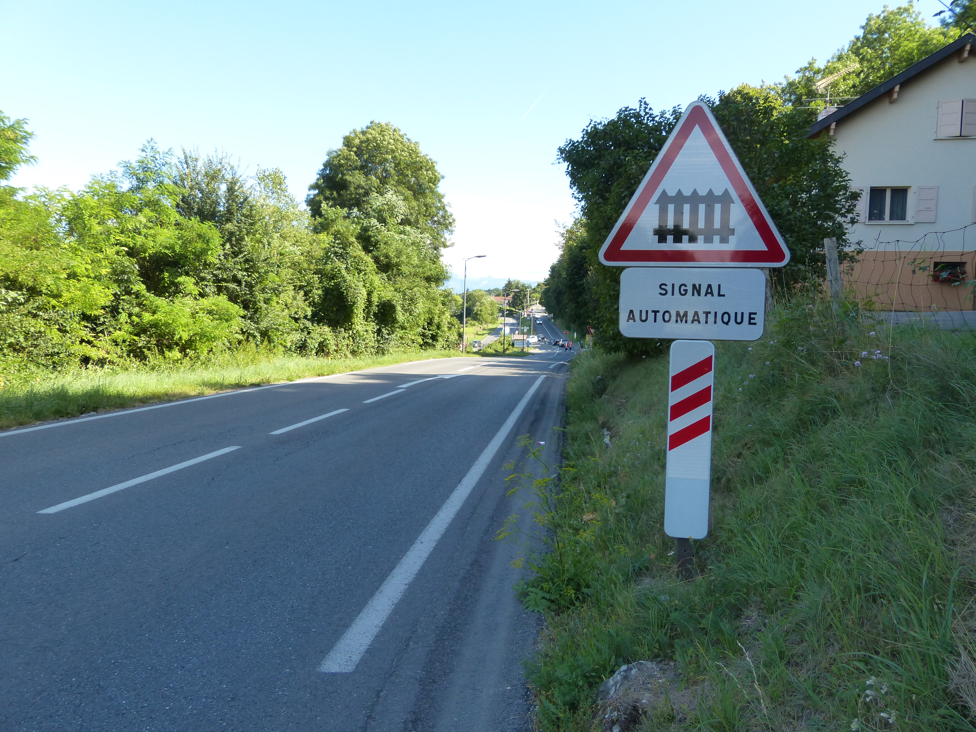 Panneau A7 et balise J10 à trois bandes, à Étrembières